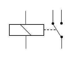 Símbolo electrico de un relé